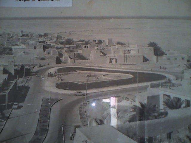 میدان استقلال میناب